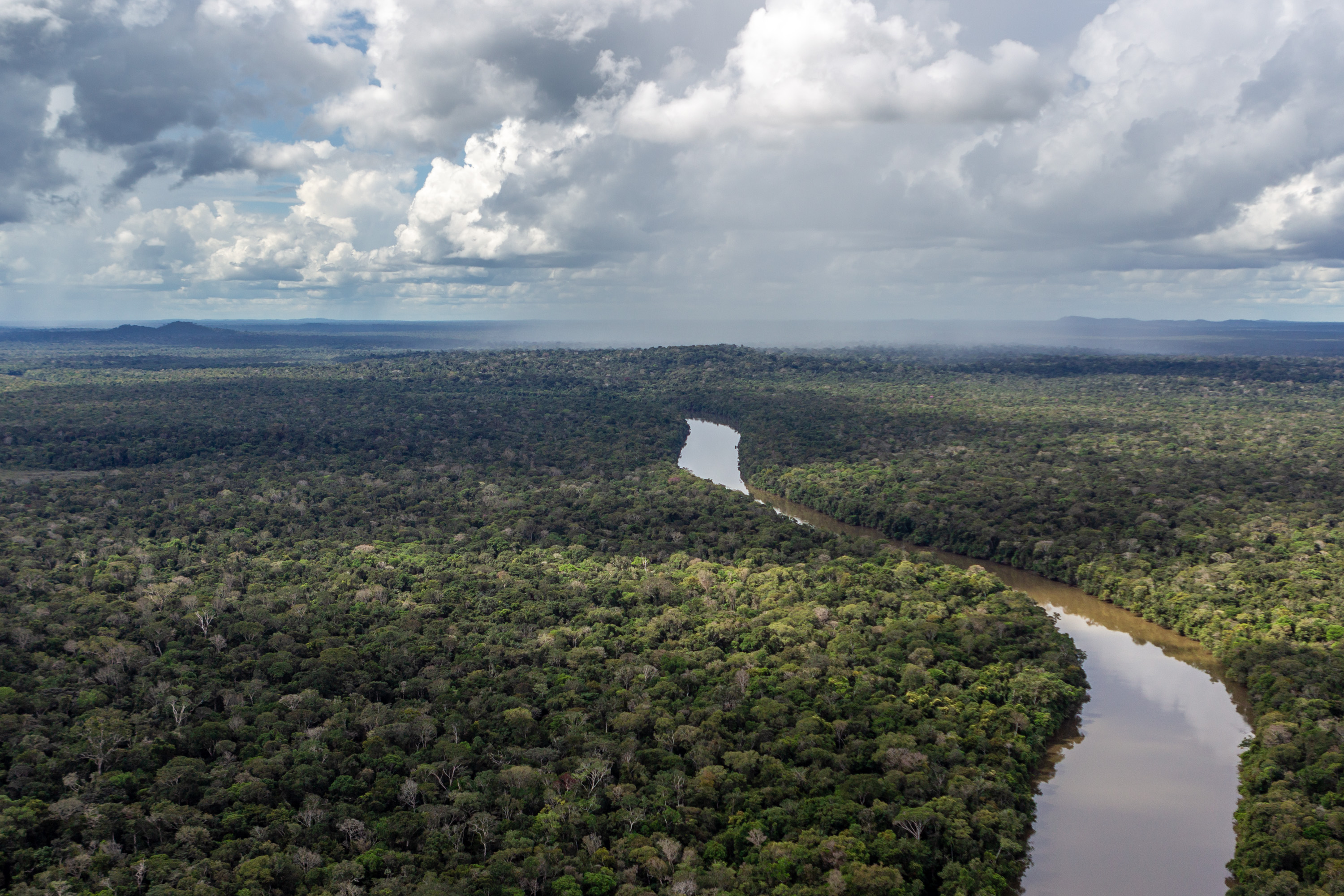 Grupo Especializado de Fiscalização (GEF) do Ibama combate desmatamento e garimpo de cassiterita na Terra Indígena Tenharim do Igarapé Preto, Amazonas Foto: Vinícius Mendonça/Ibama Mais informações